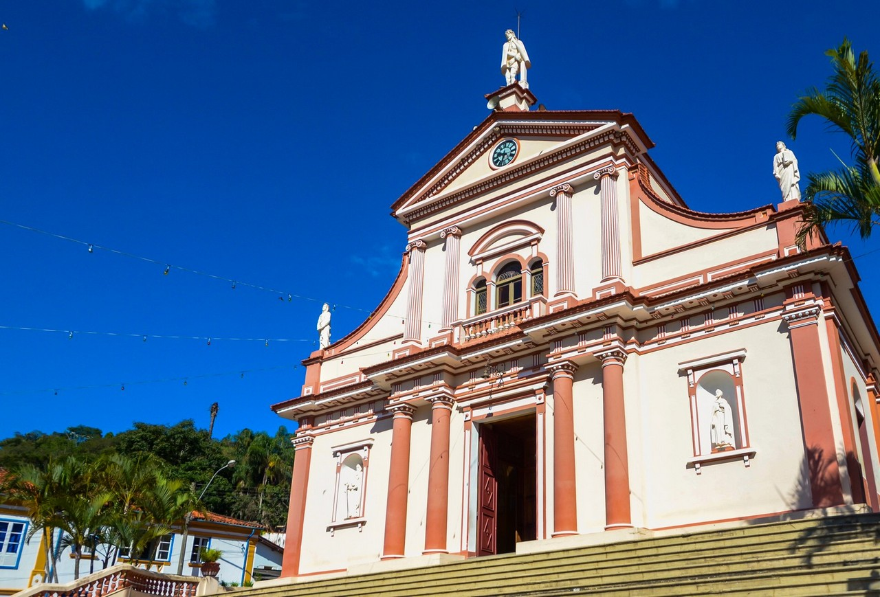 Santuário do Senhor Bom Jesus, em Monte Alegre do Sul/SP